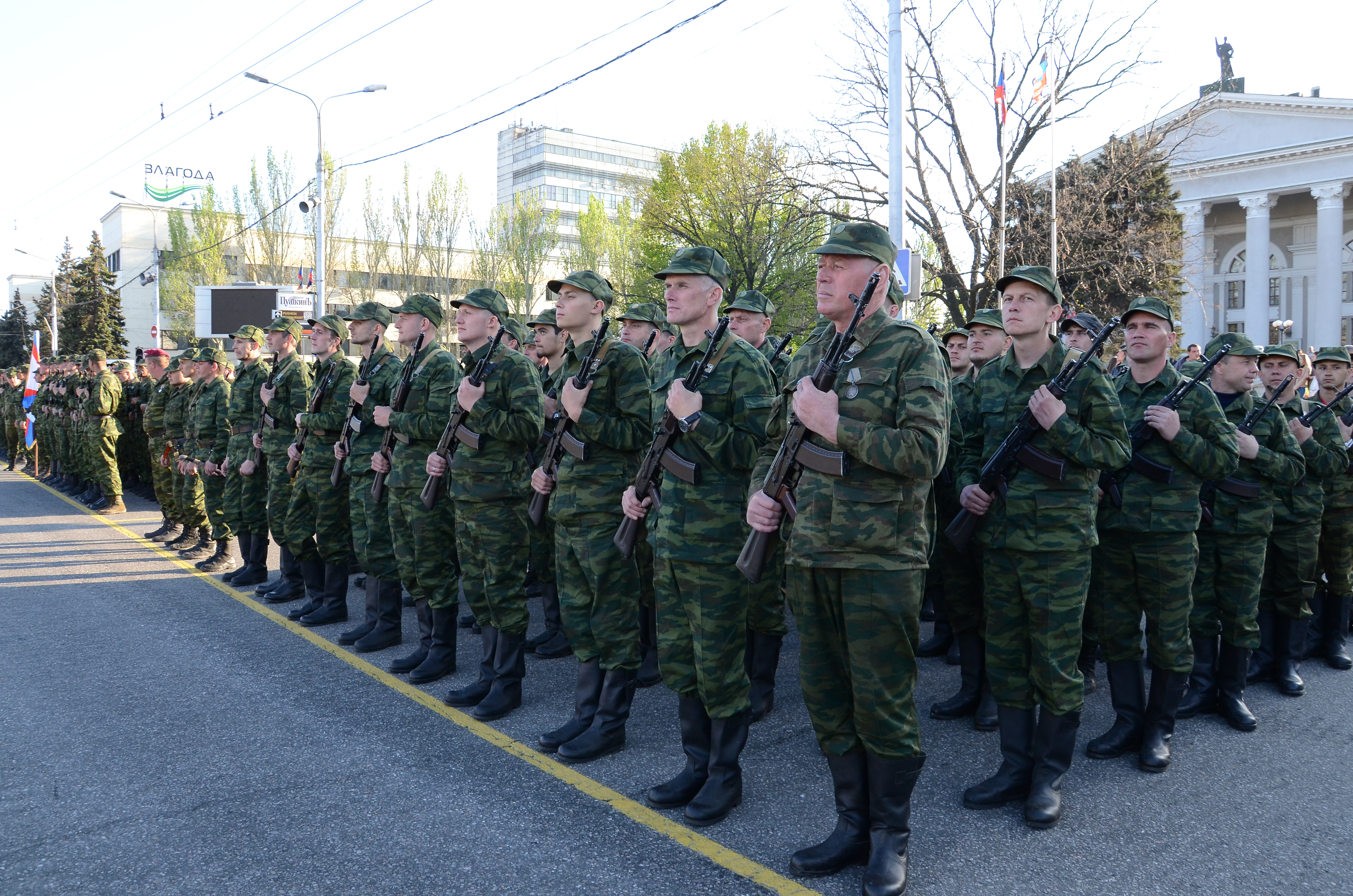 Репетиция парада в честь дня Победы в Донецке